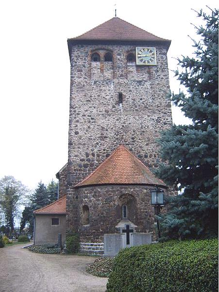 Turm der Dorfkirche Hohenseeden, Sachsen-Anhalt, Deutschland - Bild aufgenommen am 27.4.2006 durch Olaf Meister Bildqualität verbessert durch Picman